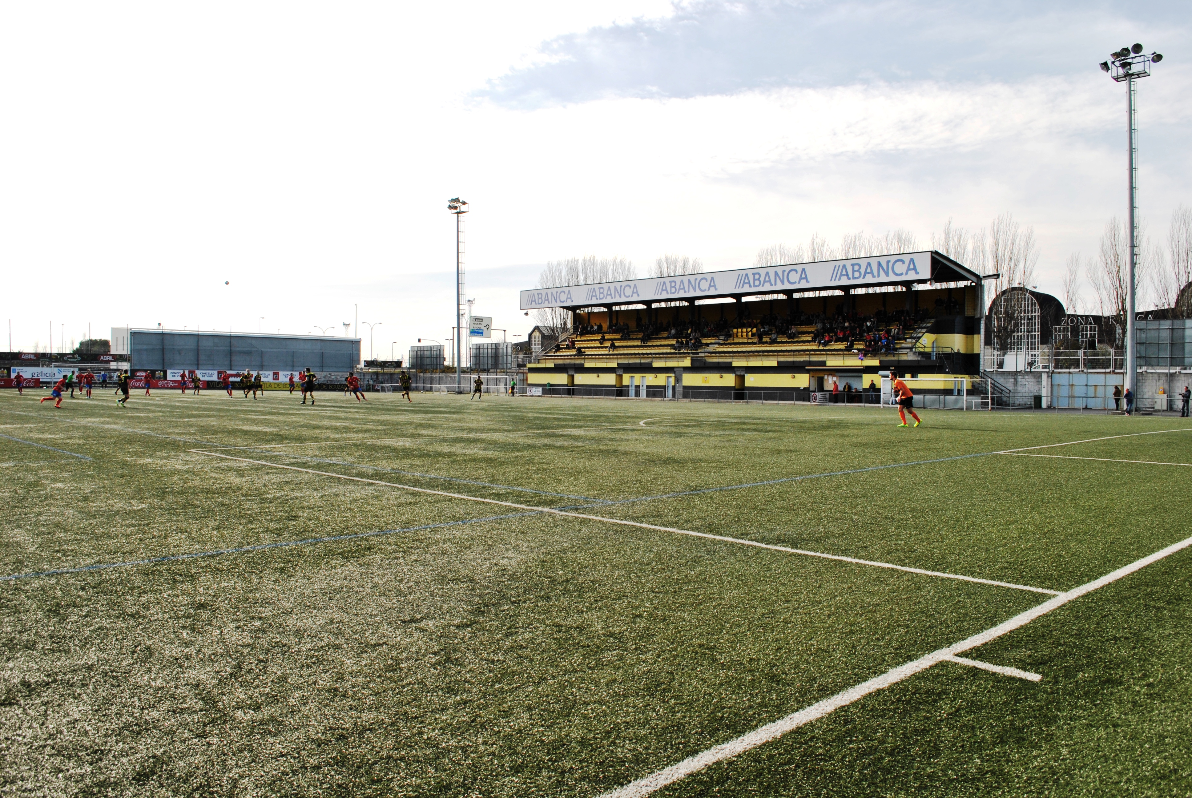 Partido do grupo 1 da 3ª División Española de fútbol entre o Rápido de Bouzas e o CD Barco no campo de fútbol municipal Baltasar Pujales. Venceu o Rápido 2-0.